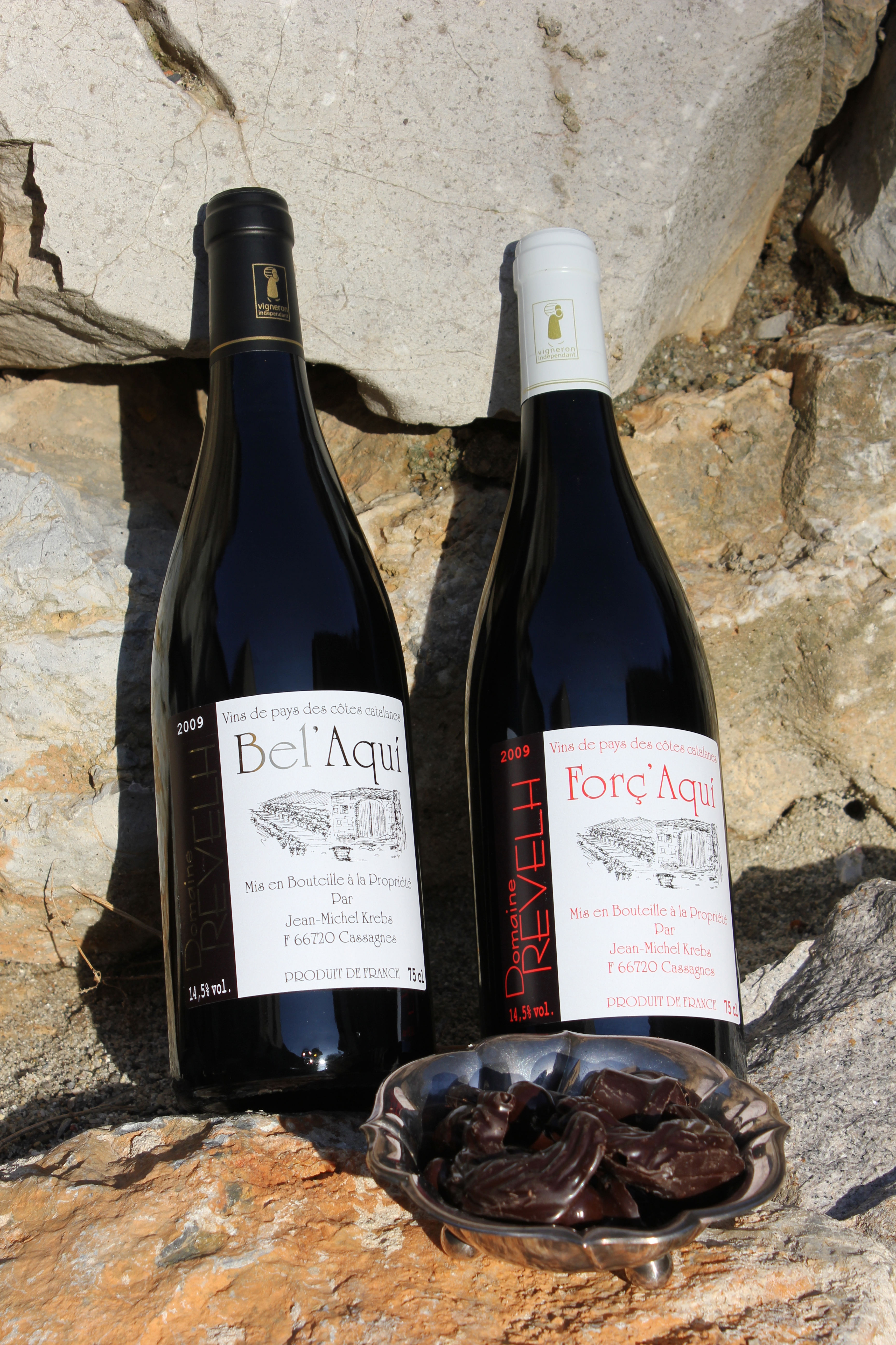 Deux bouteilles de vin de pays des côtes catalanes